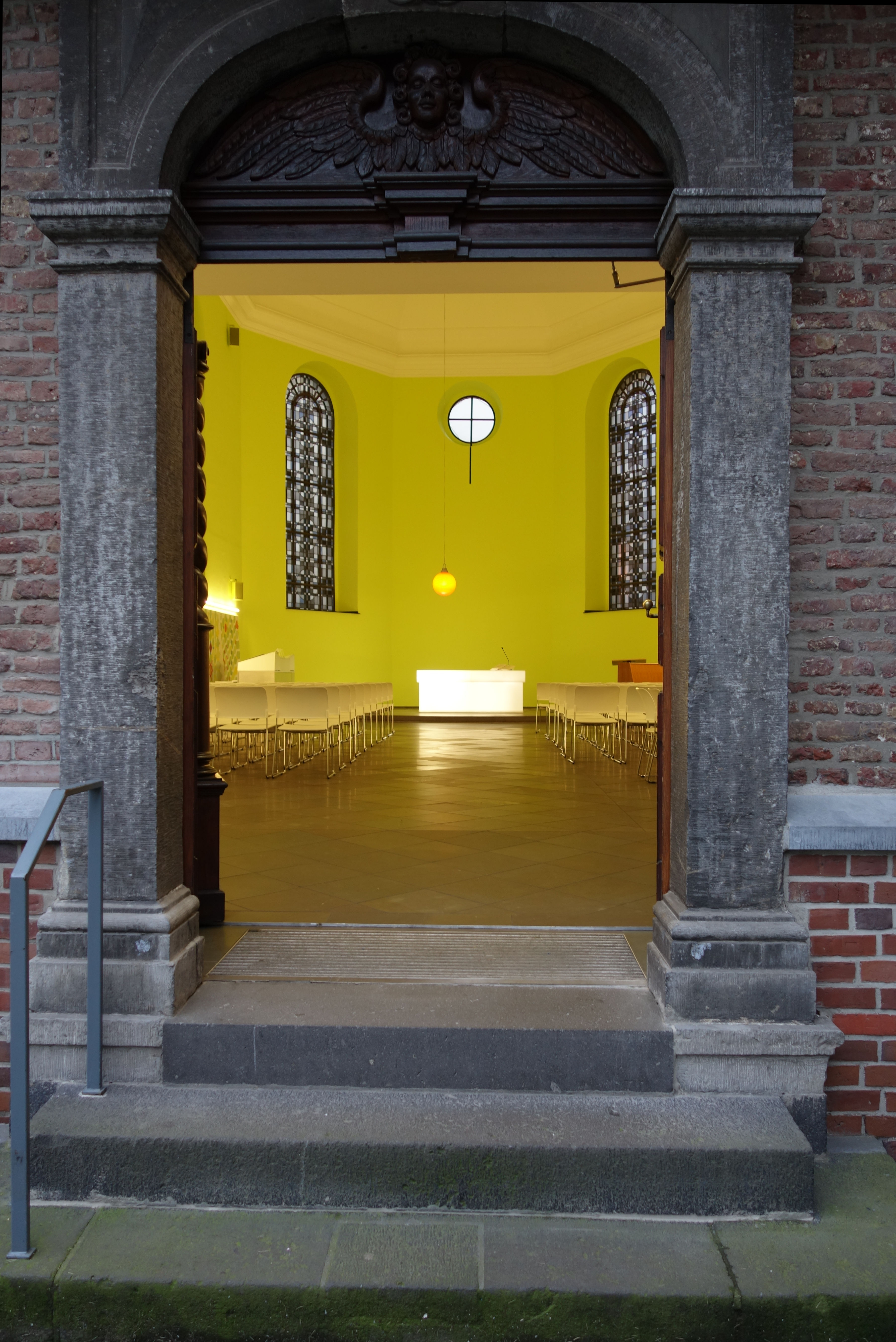 Berger Kirche, Düsseldorf, Januar 2016.